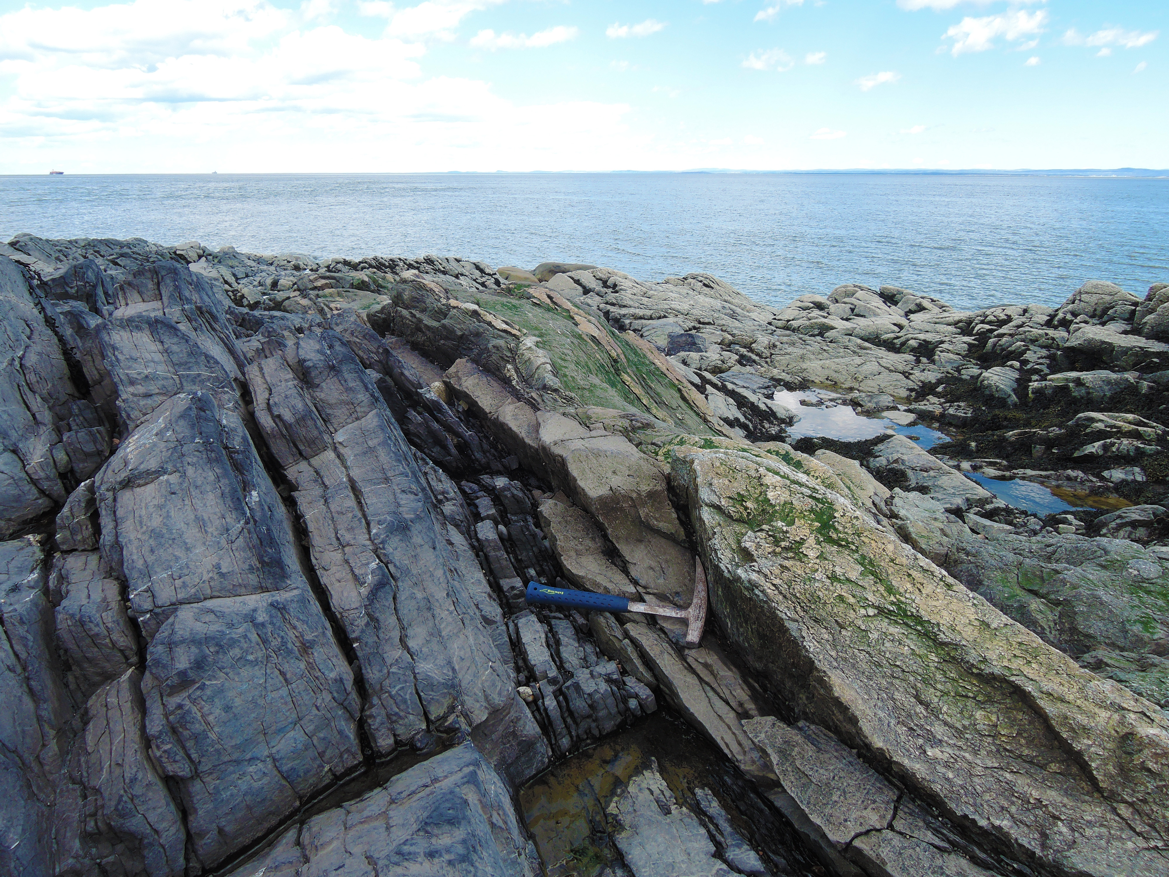 Dans l'Astroblème de Charlevoix, la mylolisthénite (impactite) s'est créée dans les plans de failles de glissements lors du réajustement du cratère, suite à l'impact météoritique. Sur cette image, à gauche, il y a du calcaire et à droite, du granite. On peut apercevoir entre les deux un dyke de mylolisthénite (impactite). Une étude statistique de leur orientation indique que ces brèches de faille ont emprunté largement les zones de faiblesse préexistantes.